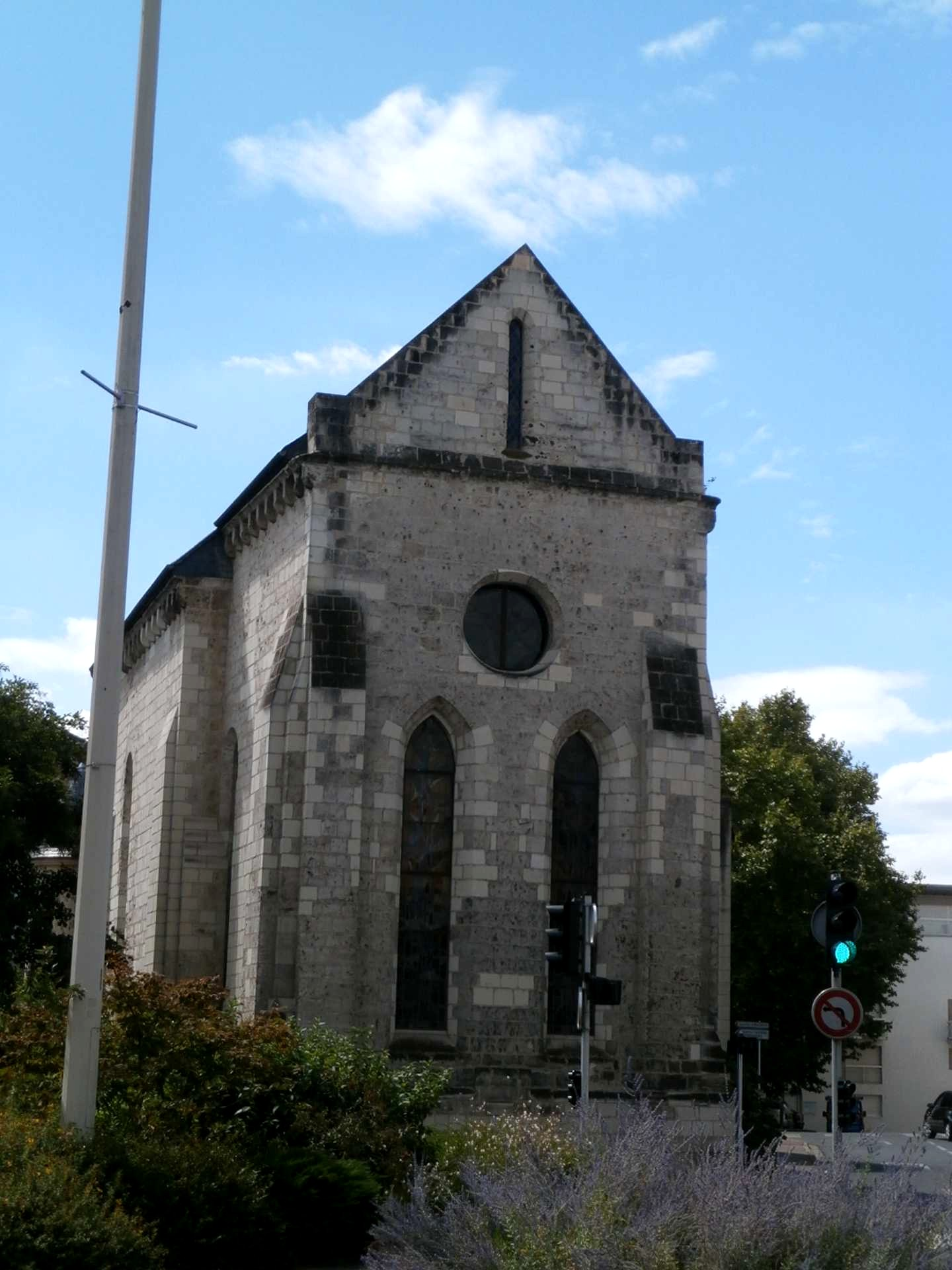 Prieuré Saint-Éloi (Tours) ; vue depuis l'Est